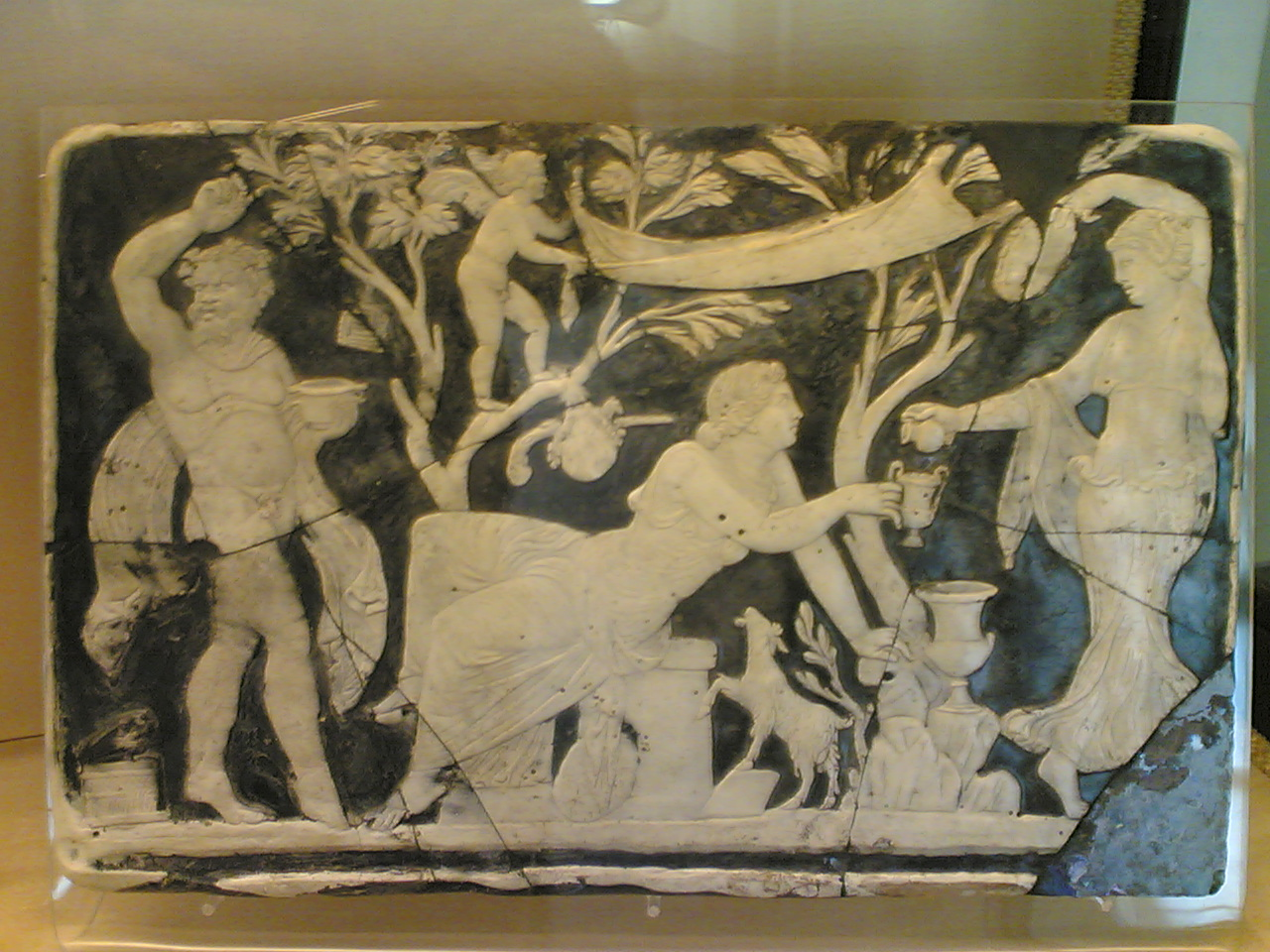 I secolo d.C. - Pannello eseguito in vetro cammeo e rappresentante scena dionisiaca. In particolare raffigura l'iniziazione di Arianna ai misteri dionisiaci. Fu ritrovato a Pompei, nelle terre di scarico tra Porta Marina e l'Insula Occidentale, probabilmente proveniente dall'abitazione di Marco Fabio Rufo. Attualmente è esposto nel Museo Archeologico Nazionale di Napoli.